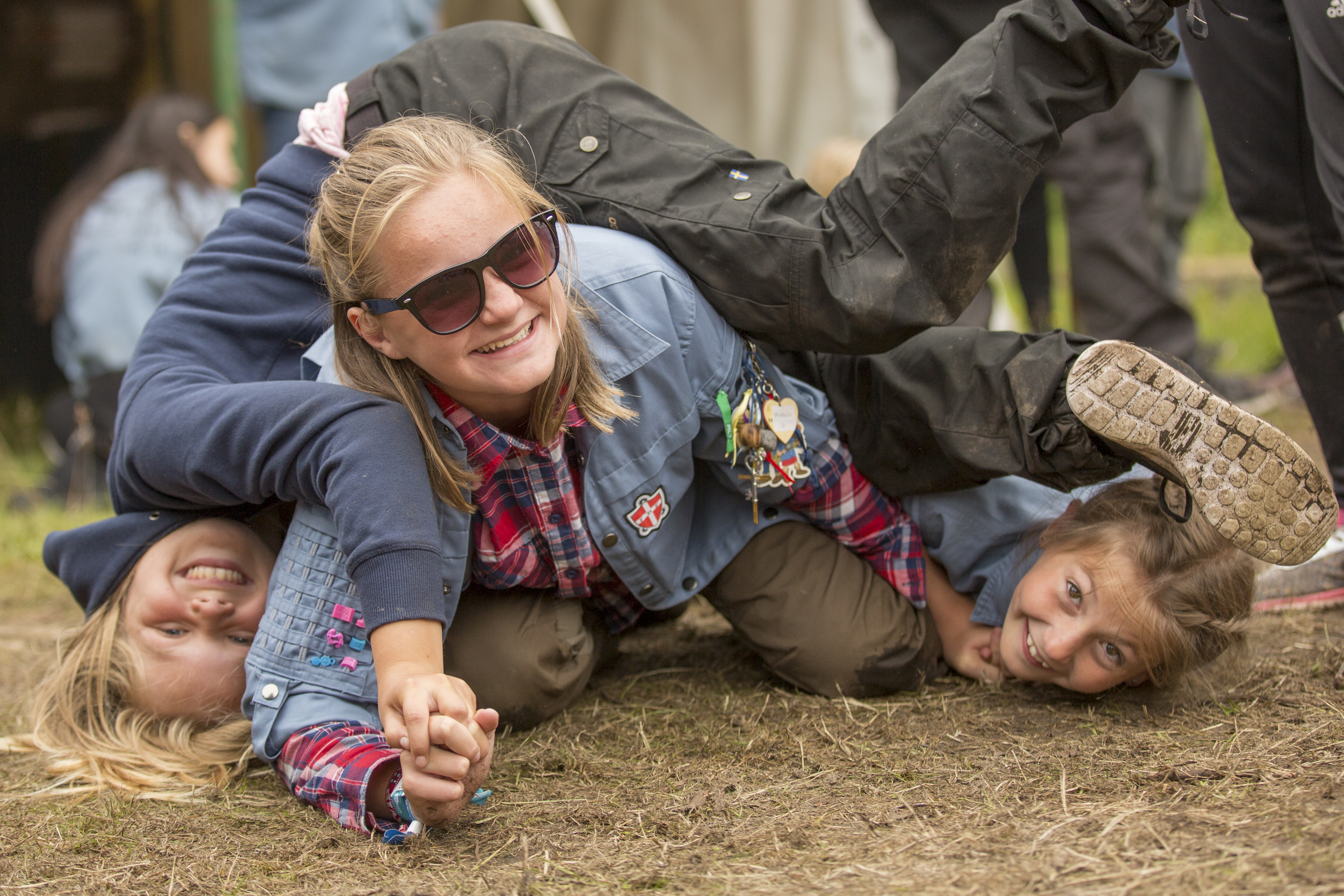 Børn og leder i leg på FDFs landslejr 2016